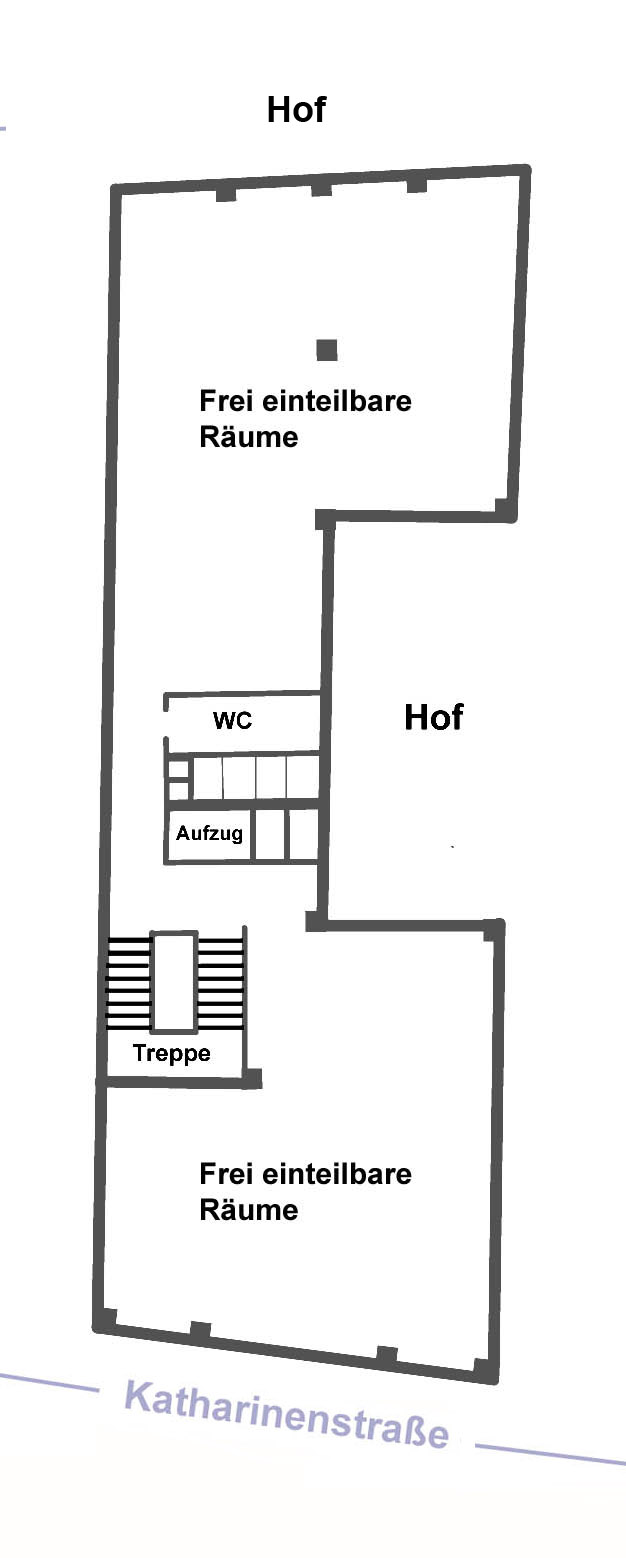 Hamburg-Altstadt, Edmund-Haus, Urspr. Grundriss (Skizze) This is a photograph of an architectural monument.